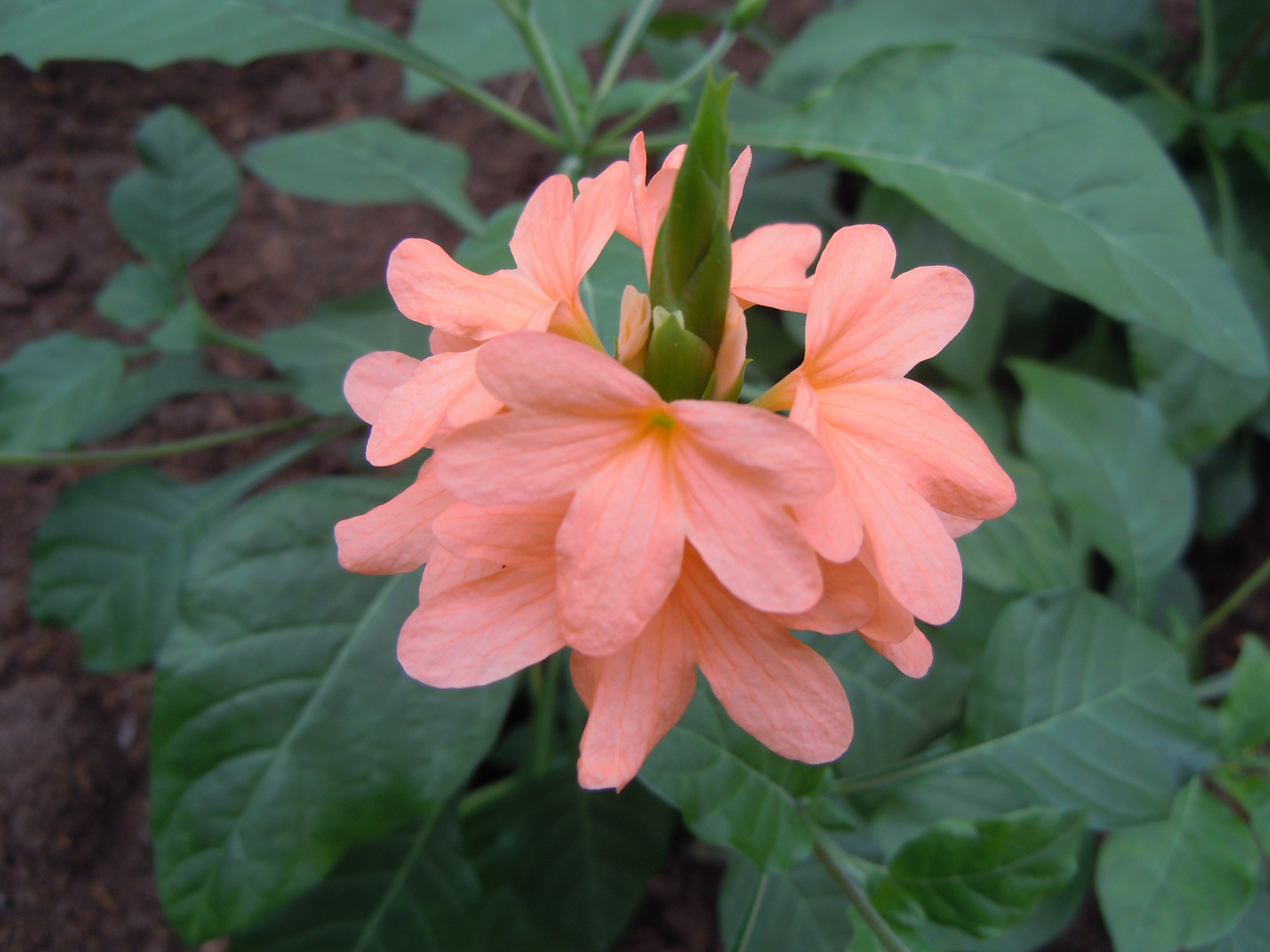 Crossandra puberula - Serres d'Auteuil